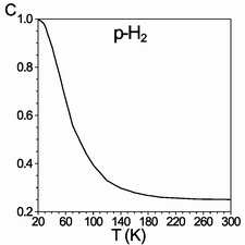 Равновесная мольная концентрация пара-водорода